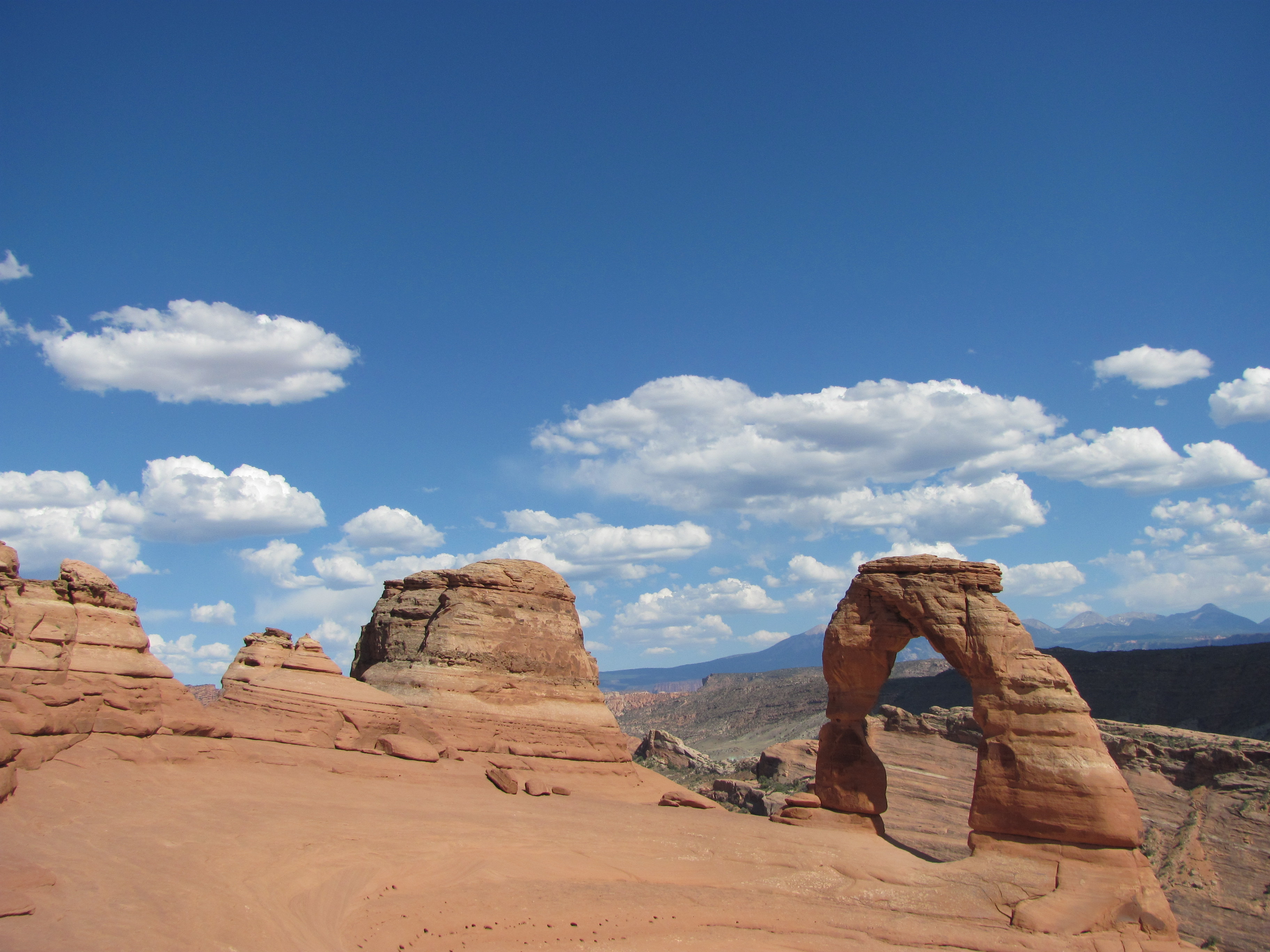 Delicate Arch